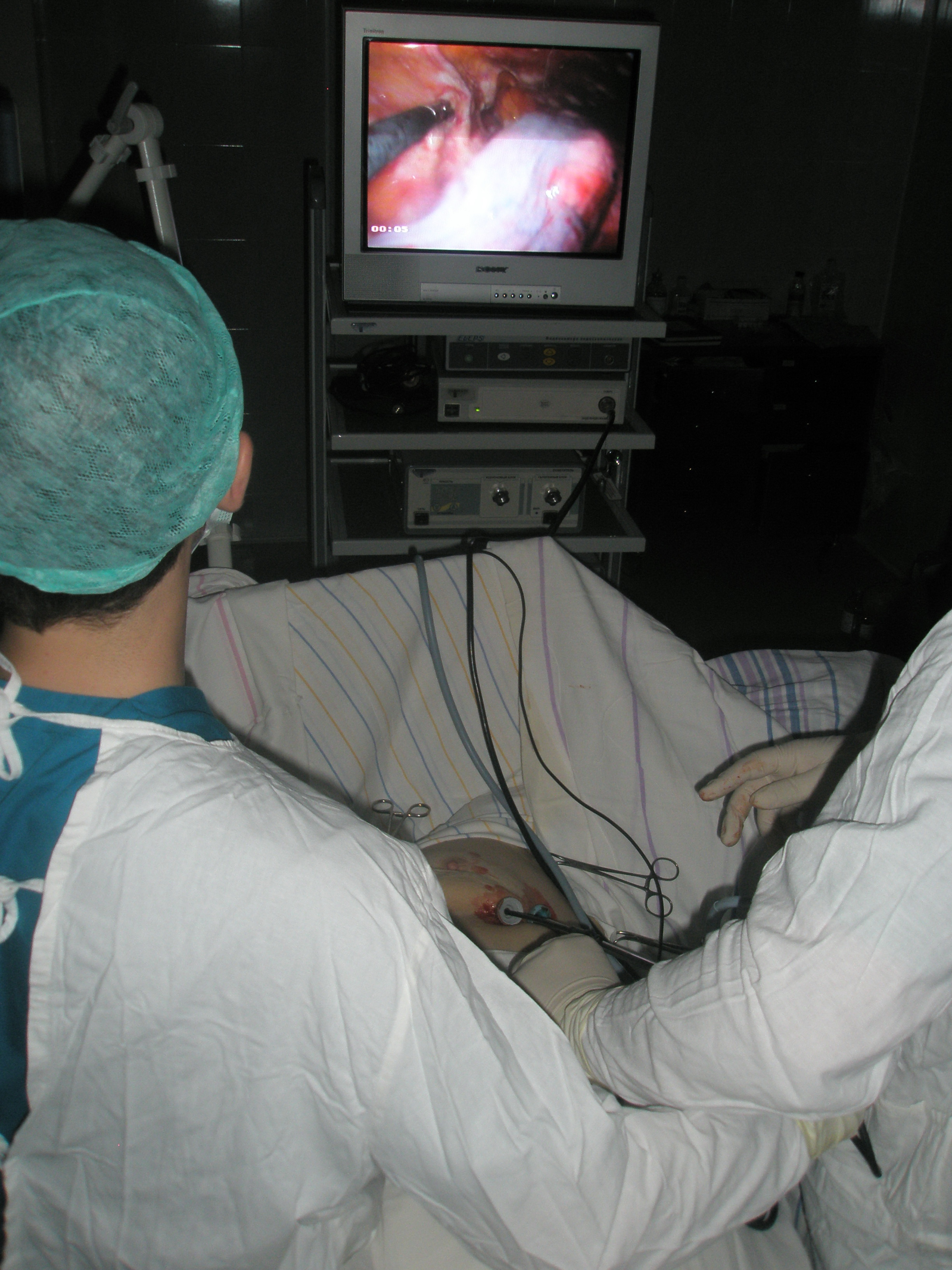 Видеоторакоскопическая операция: биопсия плевры, плевродез